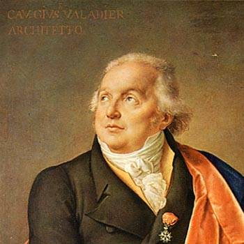 Giuseppe Valadier - Römischer Architekt und Städtebauer